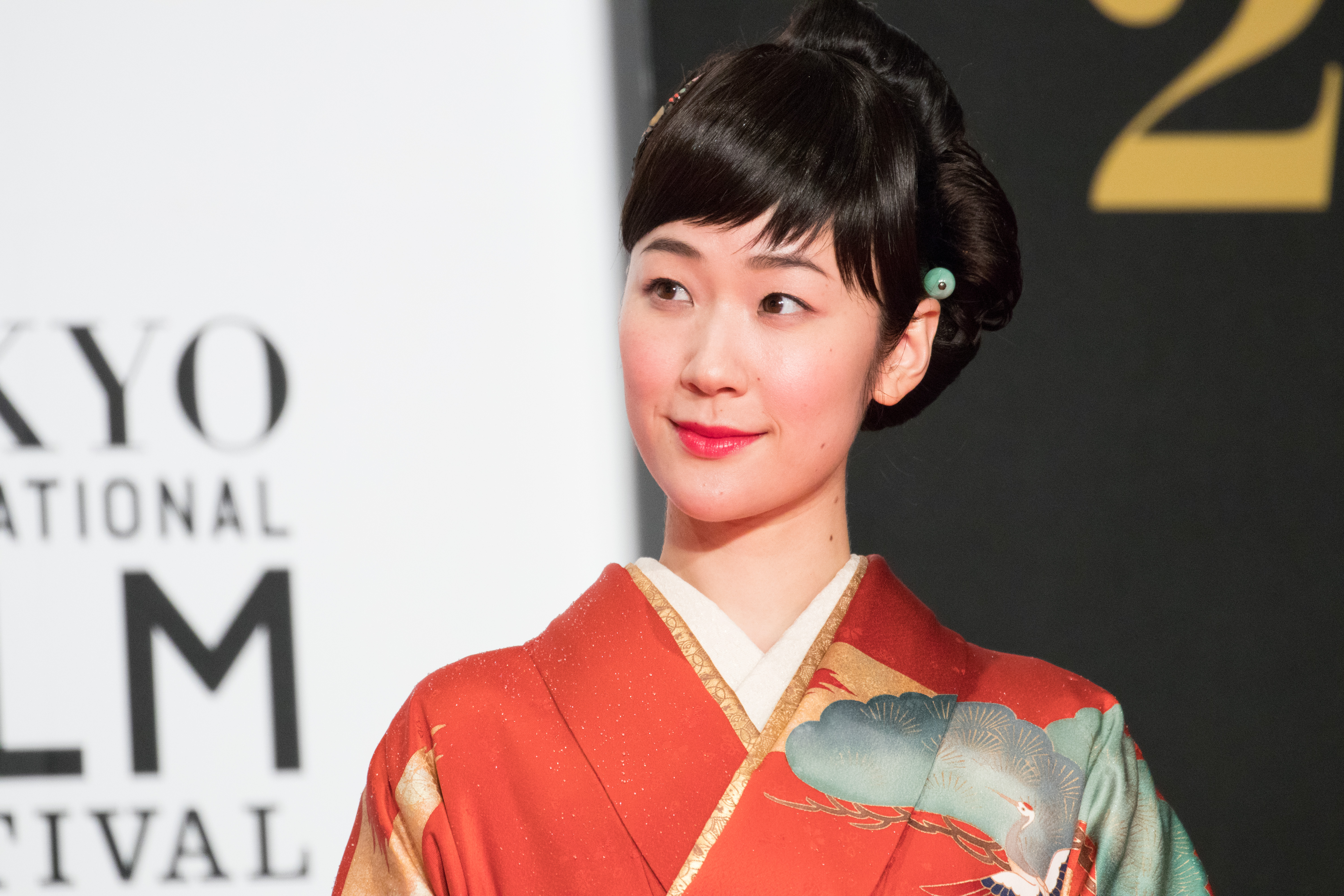 第29回 東京国際映画祭 オープニングセレモニー 黒木華